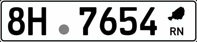 Схематичне зображення номерного знаку